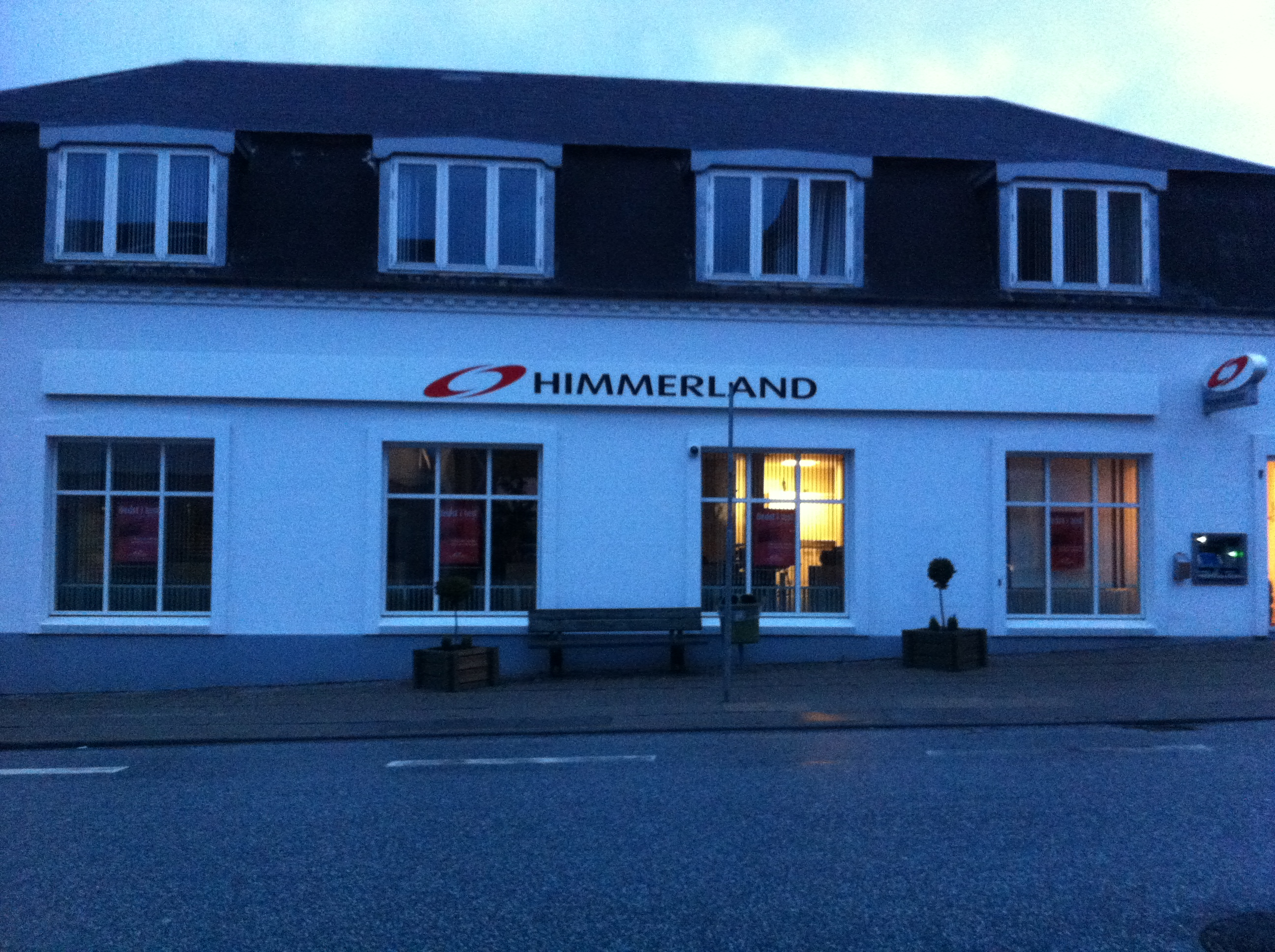 Sparekassen Himmerland på Jyllandsgade i Skørping.